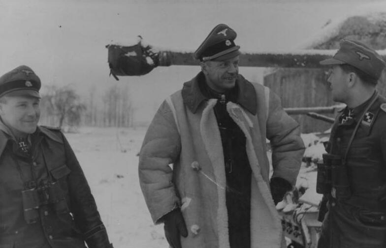 Von der Westfront Der Divisions-Kommandeur, Schwerterträger SS-Brigadeführer und Generalmajor der Waffen-SS Harmel im Gespräch mit Ritterkreuzträgern seiner besonders im Westen oft bewährten Division; PK-Waffen-SS Scherl 187/10a, T.3754 Westen, Februar 1945